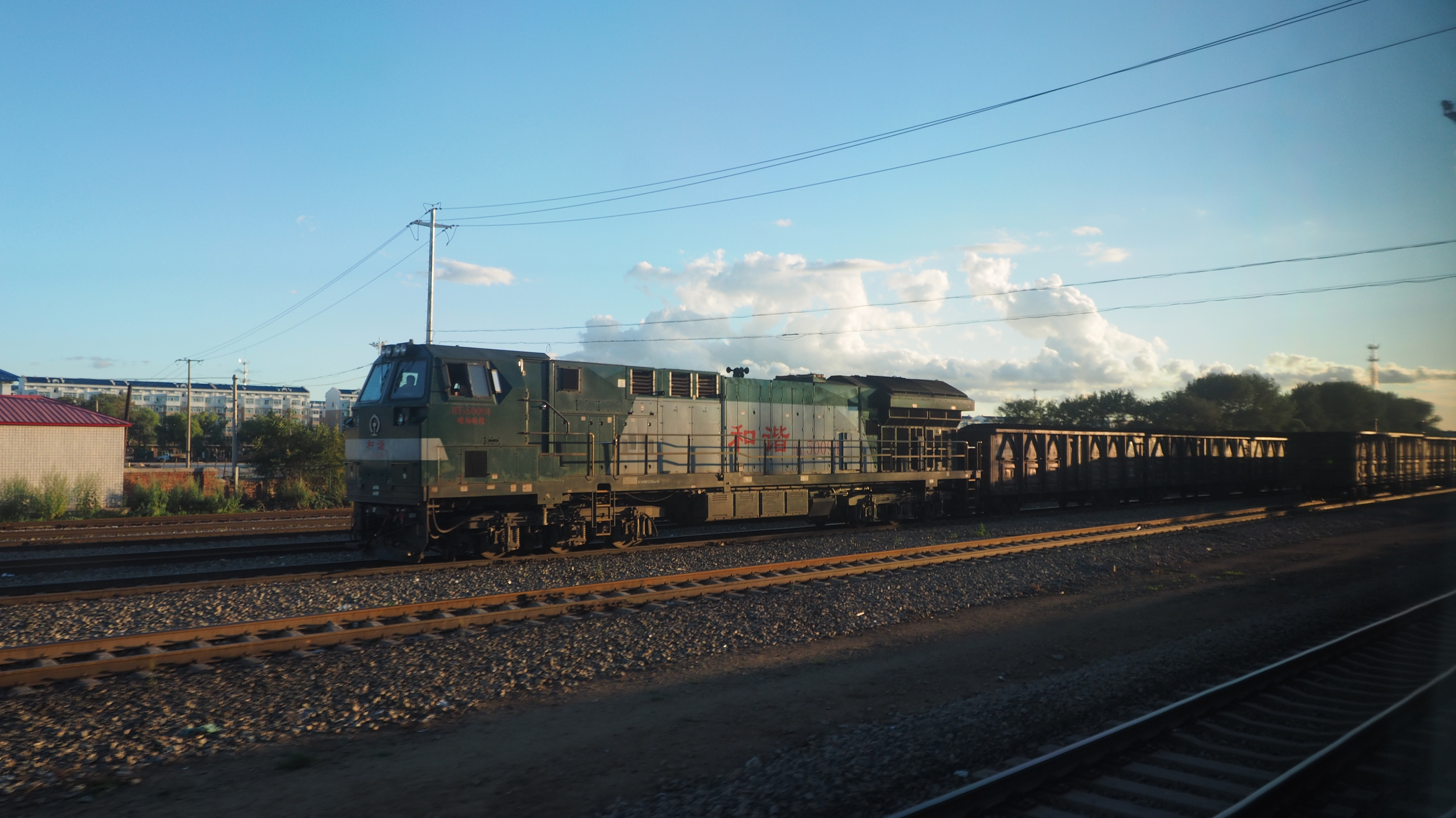 GE Locomotive